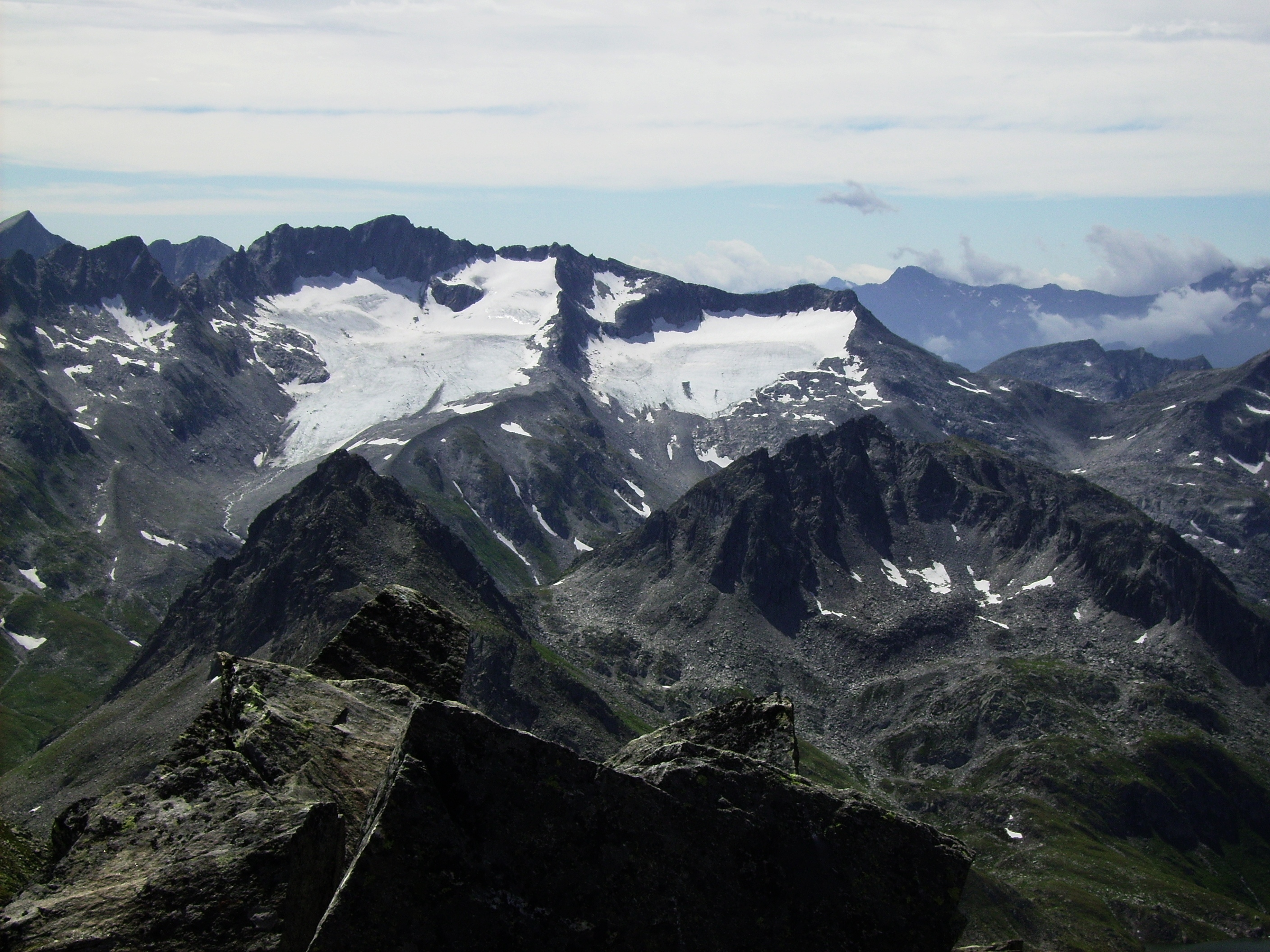 Der Maighelsgletscher, Piz Borel und Piz Ravetsch vom Badus aus gesehen